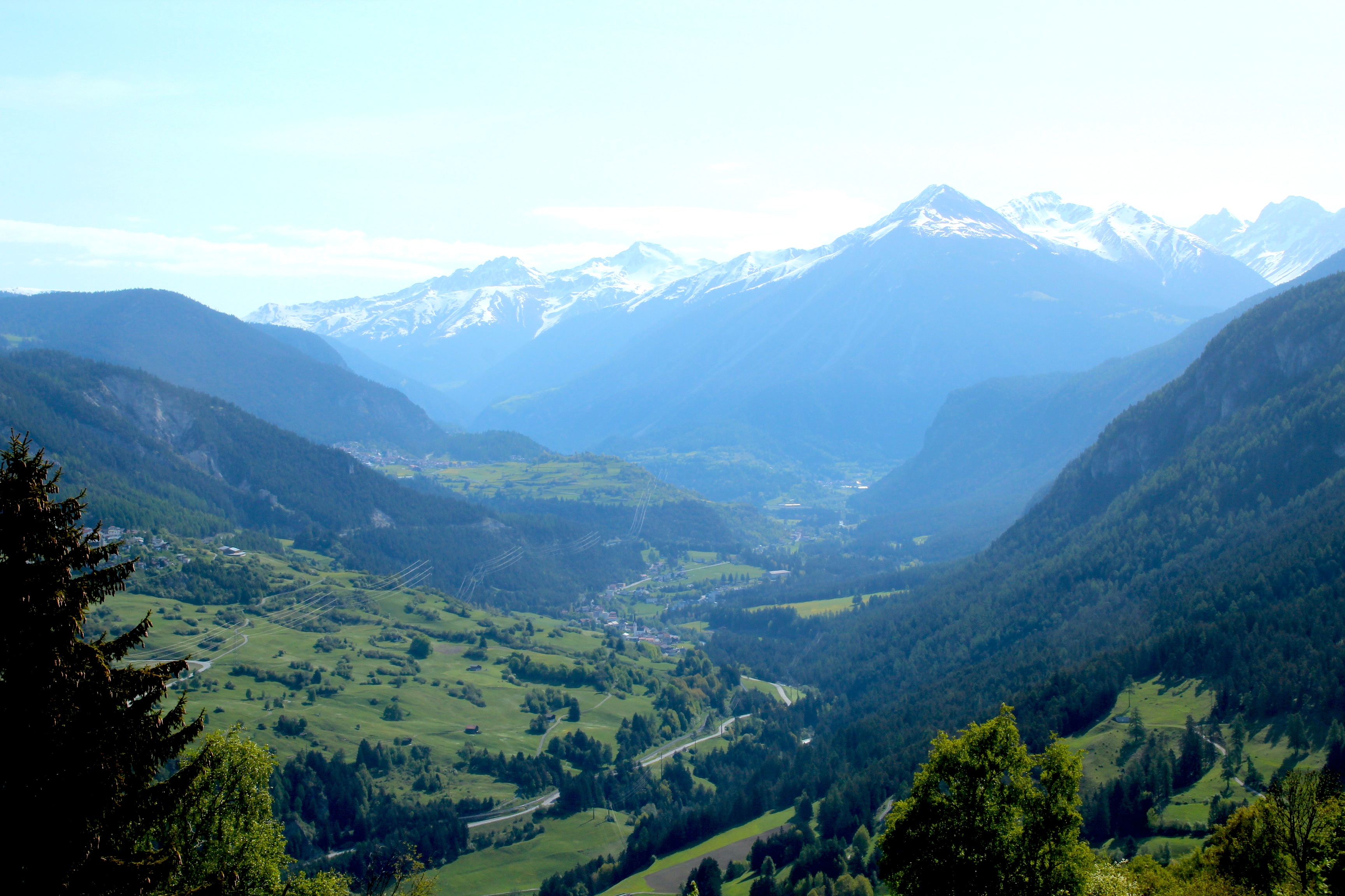 Albulatal nach Osten, in der Bildmitte Surava